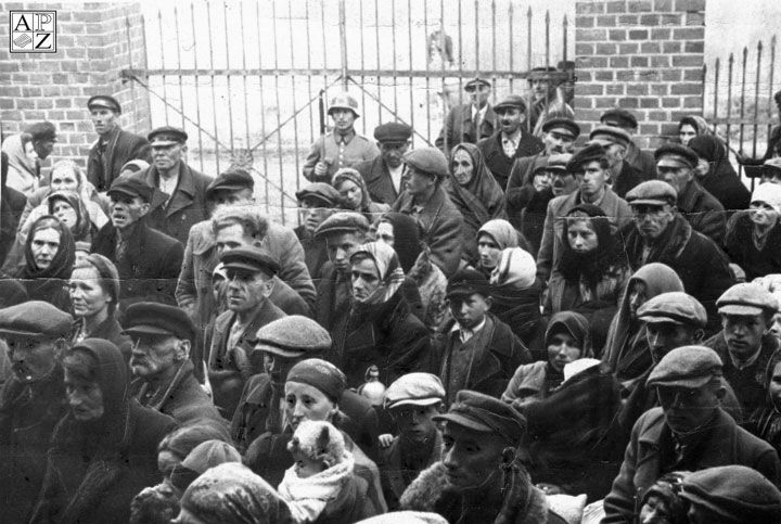 Mieszkańcy powiatu biłgorajskiego wysiedlani przez hitlerowskie władze okupacyjne.